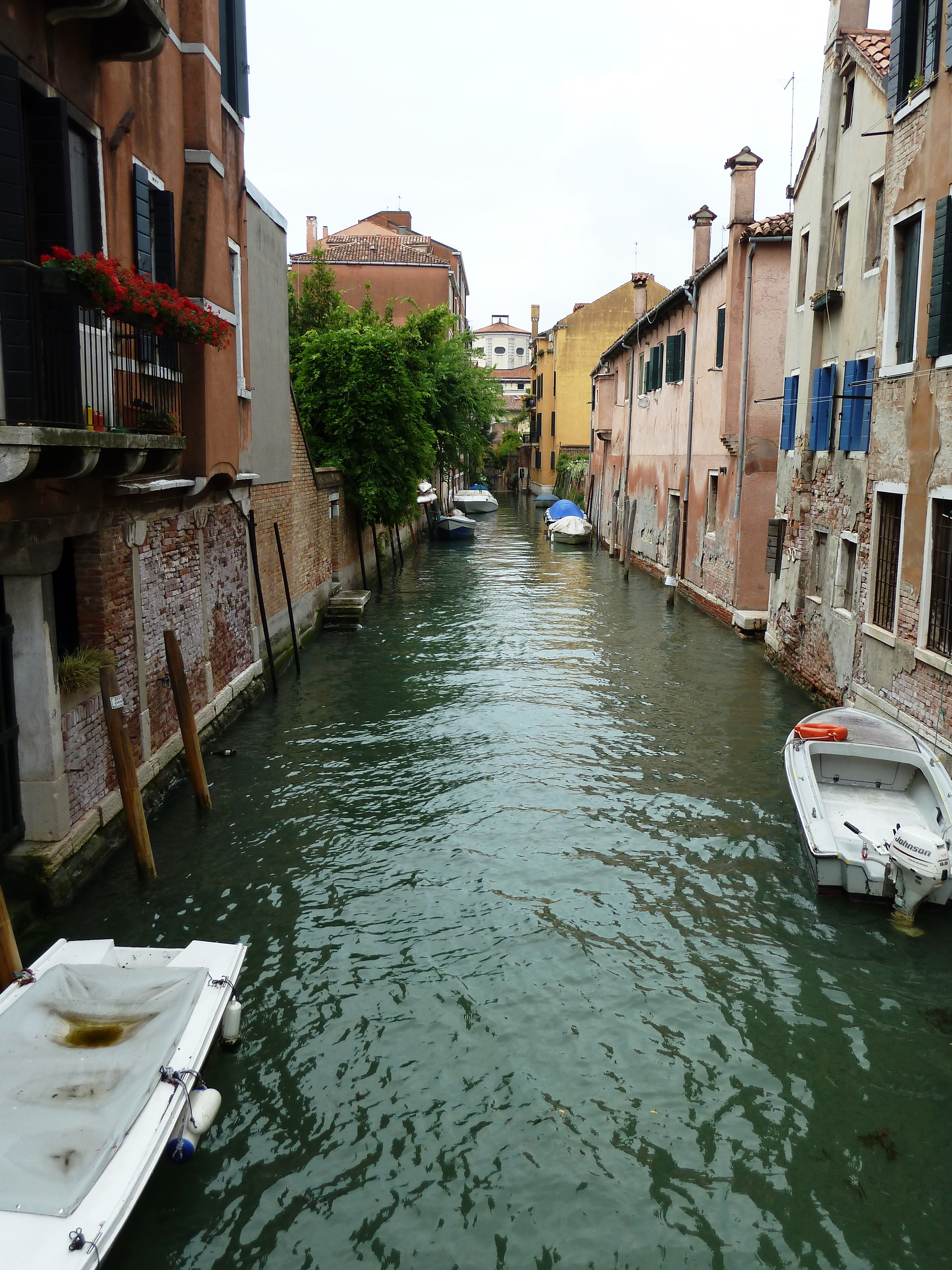 Rio de la Caziola (Venice)